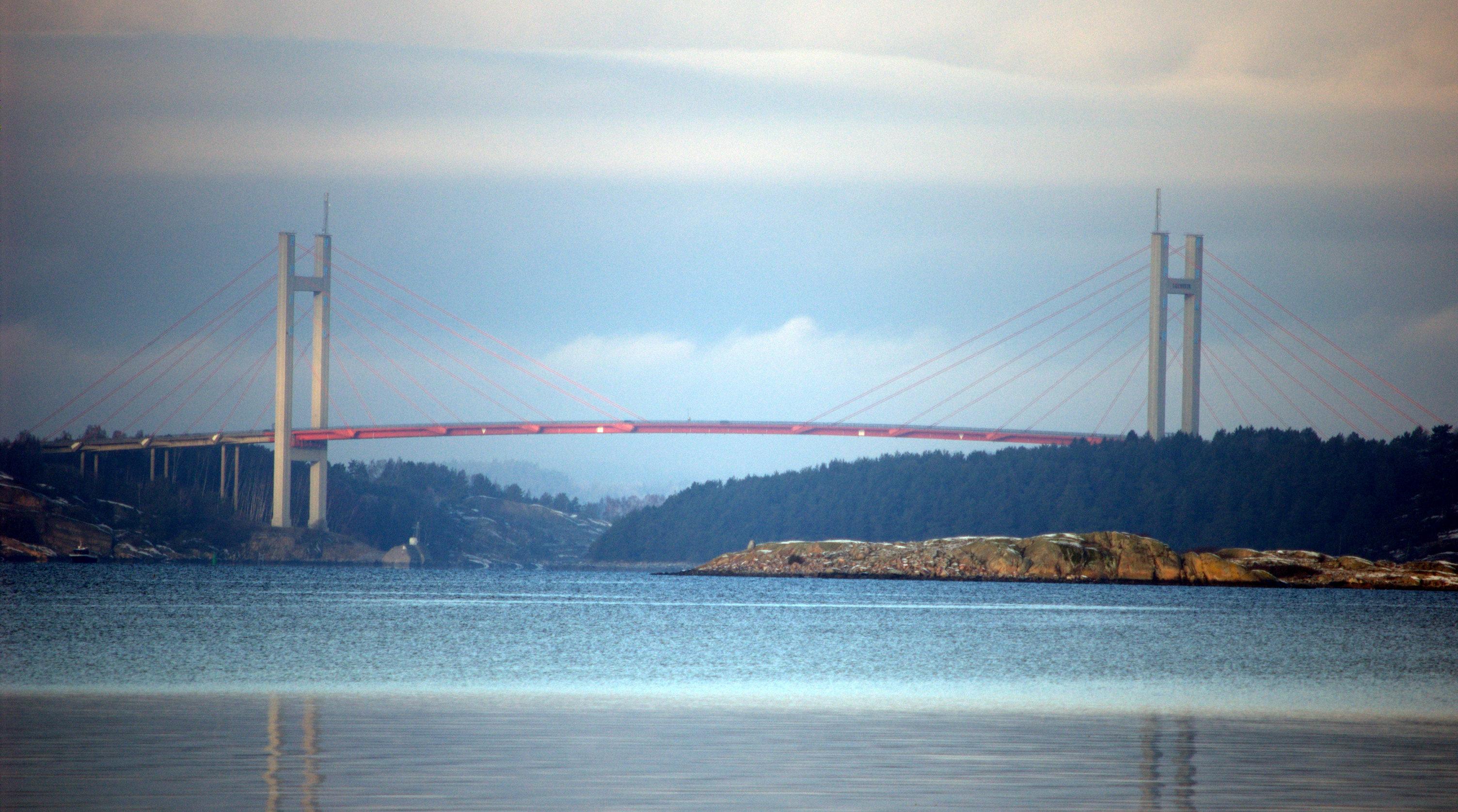 Tjörn bron fotade från Stora höga